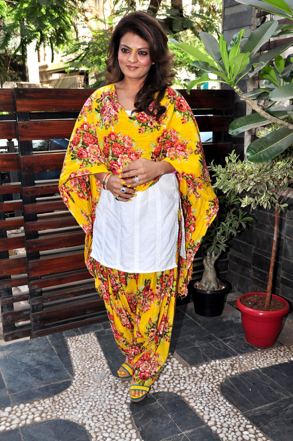 Sheeba unveil her latest summer couture collection